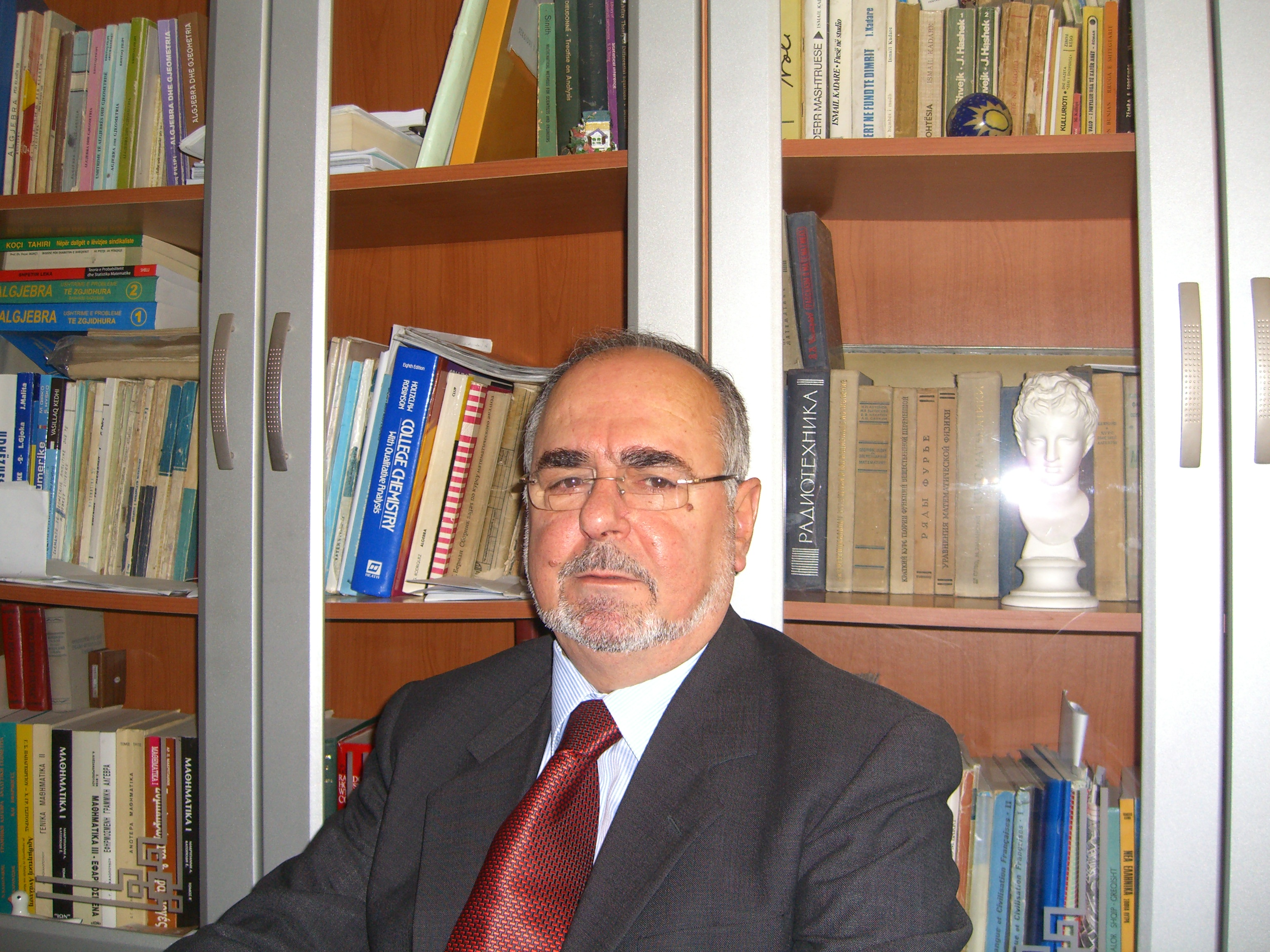 Kjo foto eshte bere ne bibliotekne e Prof Kristaq Filipit